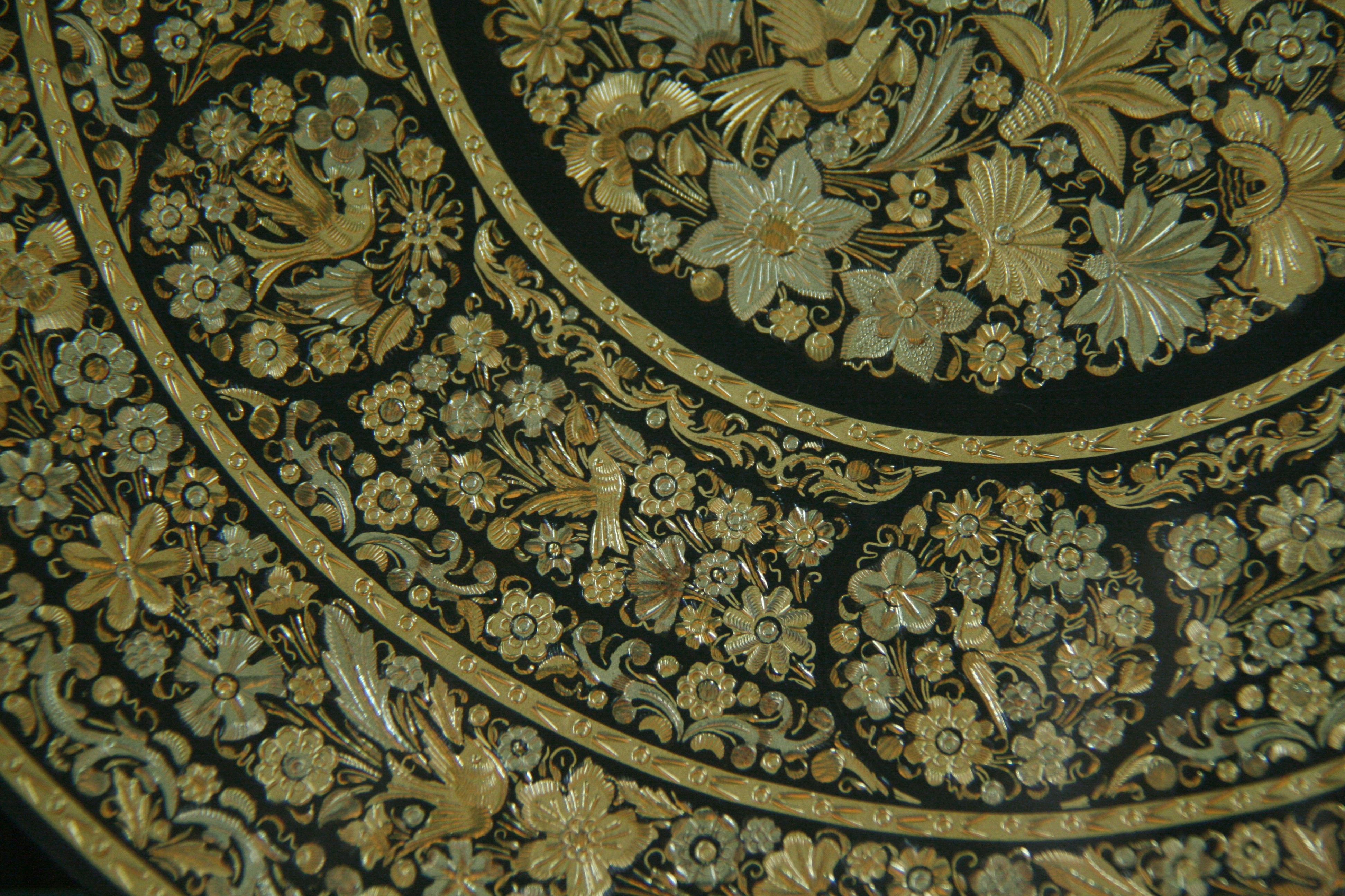 Damasquinado